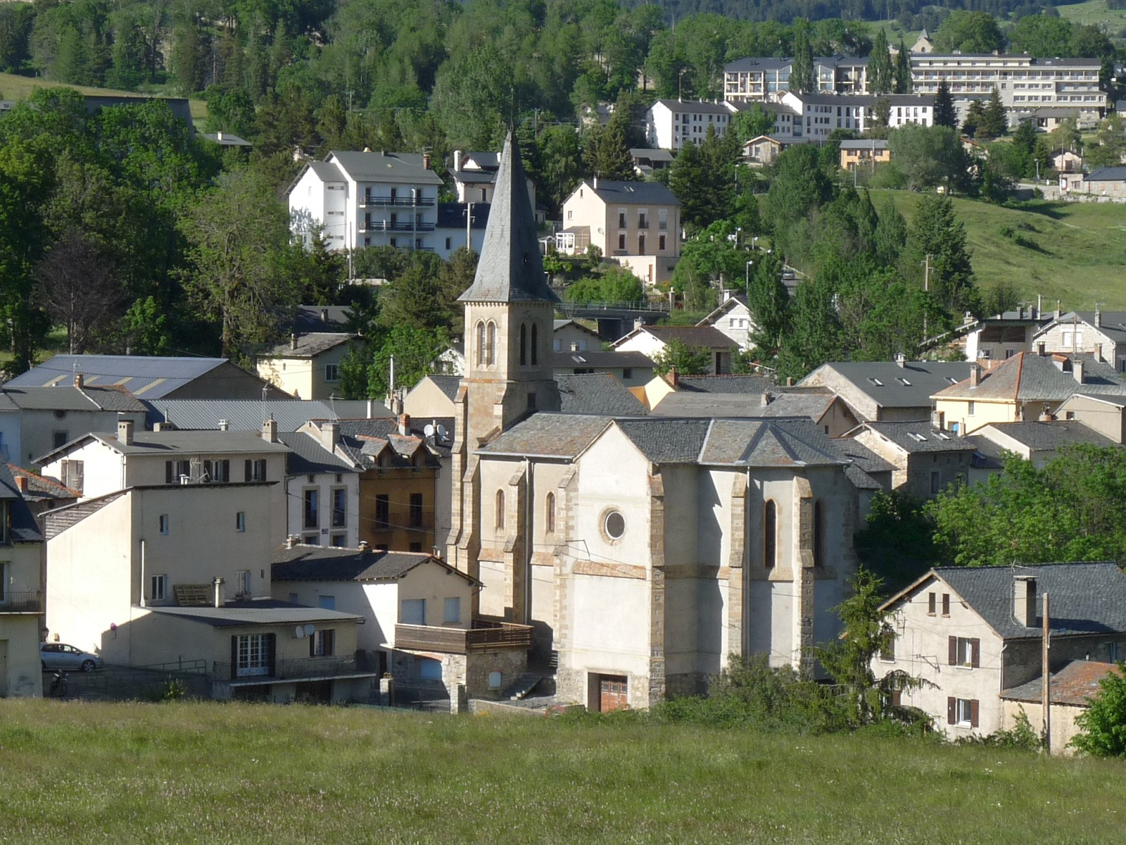 Eglise de La Cabanasse, Pyrénées-Orientales, France